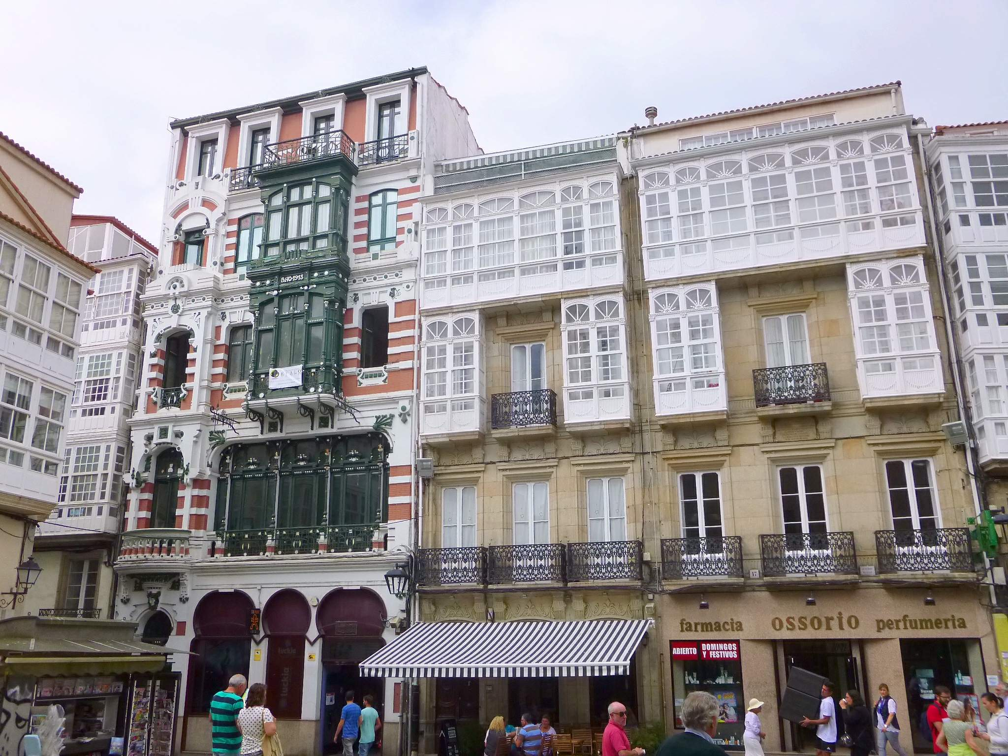 Paisaje urbano en A Coruña (Galicia, España)